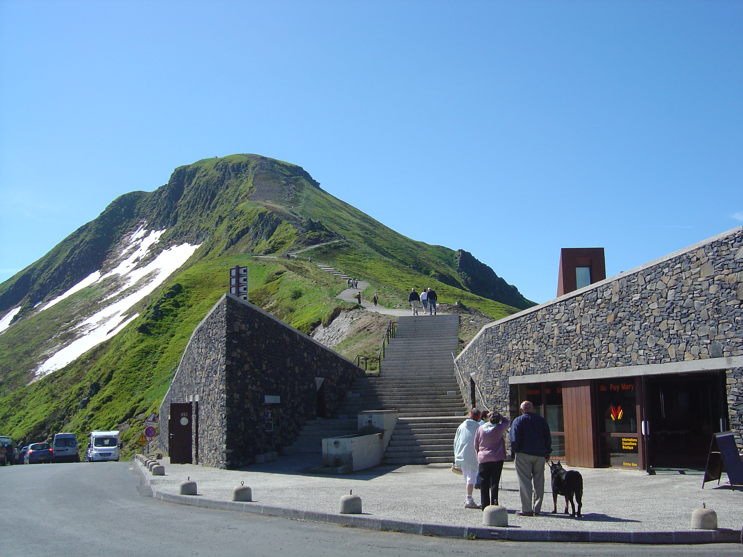 Le Puy Mary vu depuis le Pas de Peyrol. Escaliers en béton pour y grimper.